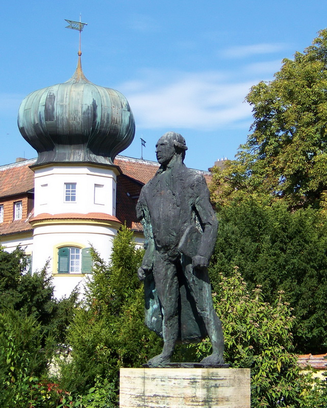 Wiguläus Xaverius Aloysius Freiherr von Kreittmayr. Denkmal beim Schloss Offenstetten, Landkreis Kelheim. Die überlebensgroße Bronzefigur wurde 1962 vom Bildhauer Alexander Fischer geschaffen. Ursprünglich war die Skulptur für den Promenadeplatz in München vorgesehen.